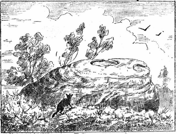 Dessin de Honoré Jacquinot de 1886, paru dans les Bulletins de la Société d'anthropologie de Paris et représentant la Maison du Renard à Lormes (Nièvre, France)